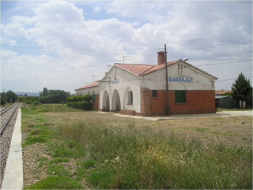 Apeadero de Badules.